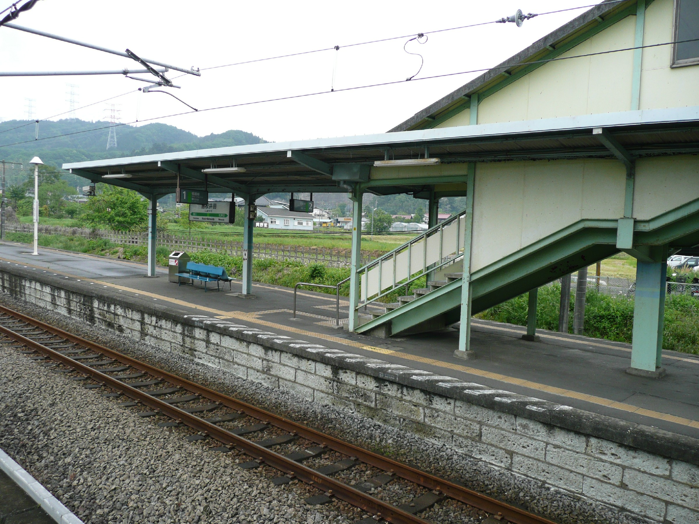 西松井田駅ホーム